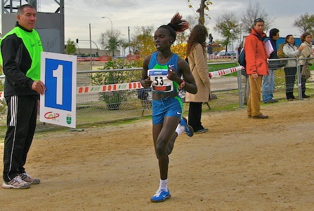 Vivian Cheruiyot pasa por el Km 1